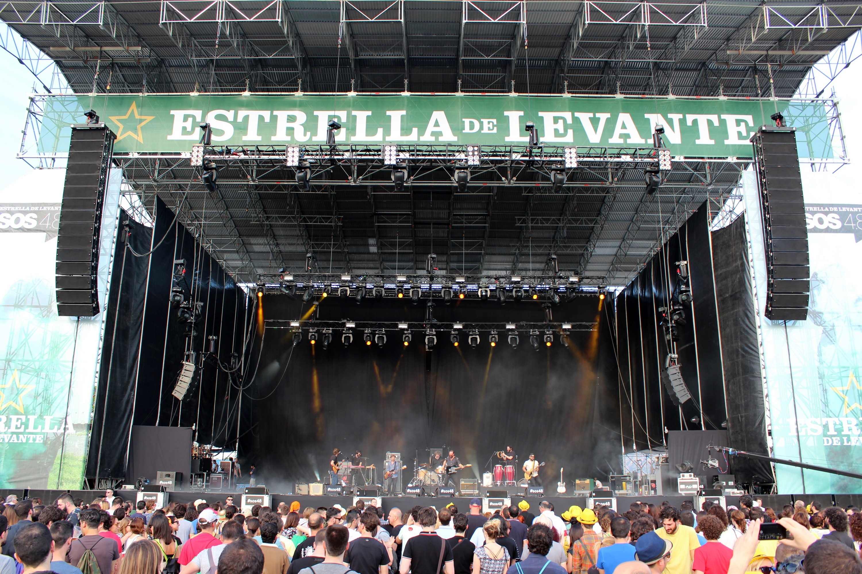 Festival internacional de acción artística SOS 4.8, celebrado en la ciudad de Murcia, España. Fotografía del escenario principal Estrella de Levante, año 2015.